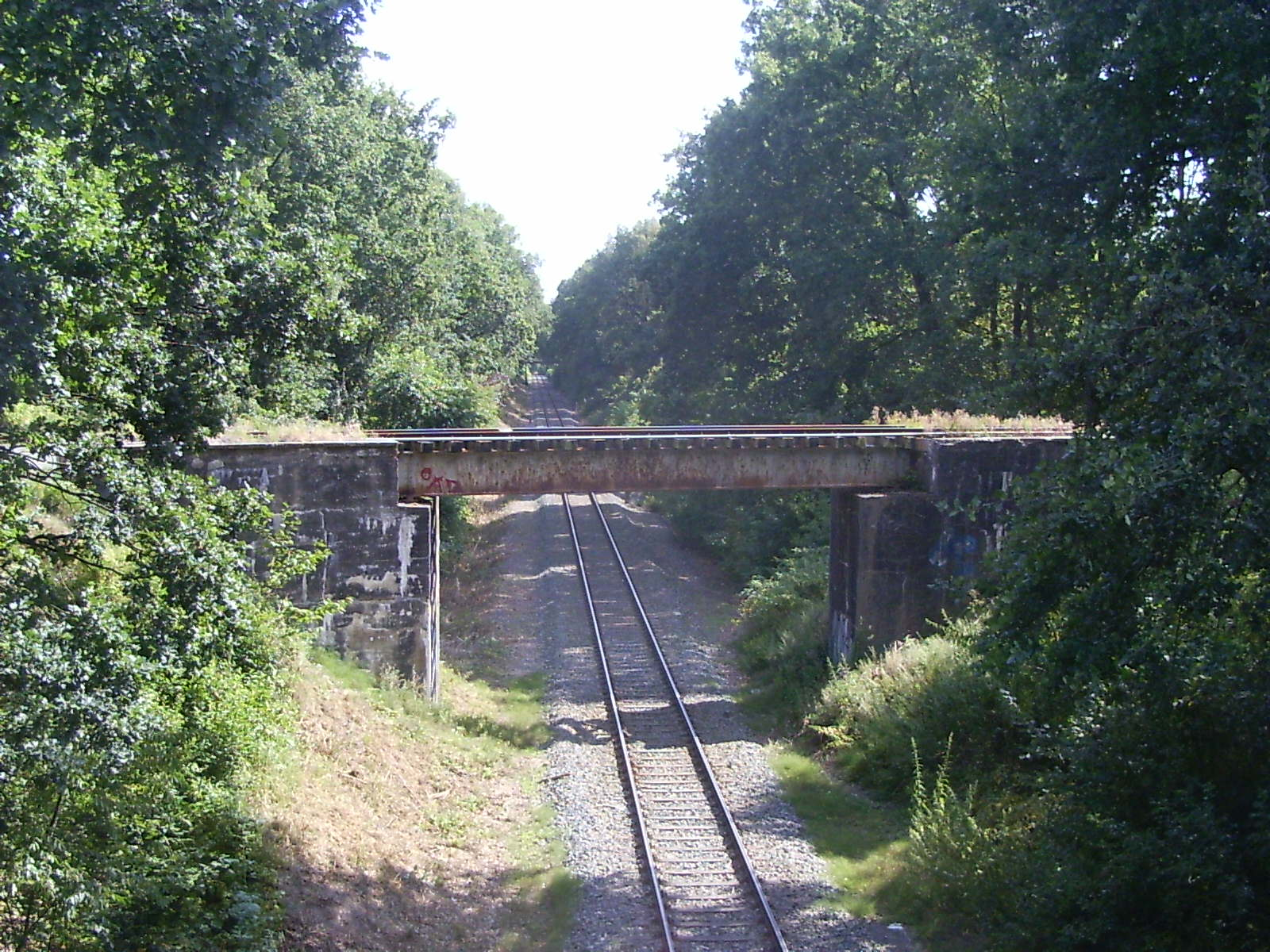 Zeven, ongelijkvloerse kruising van de twee spoorlijnen